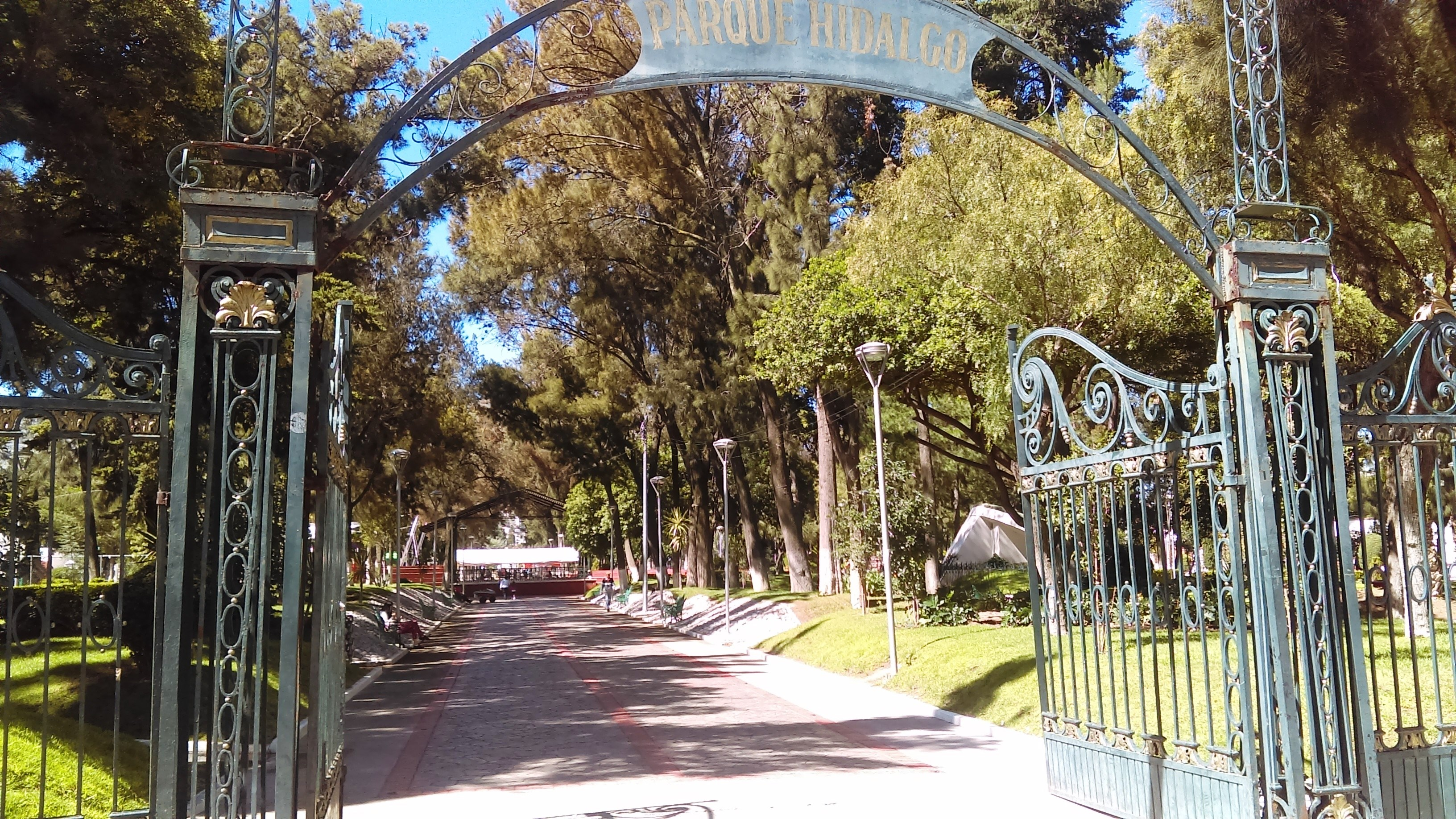 Parque Hidalgo en Pachuca, Hidalgo